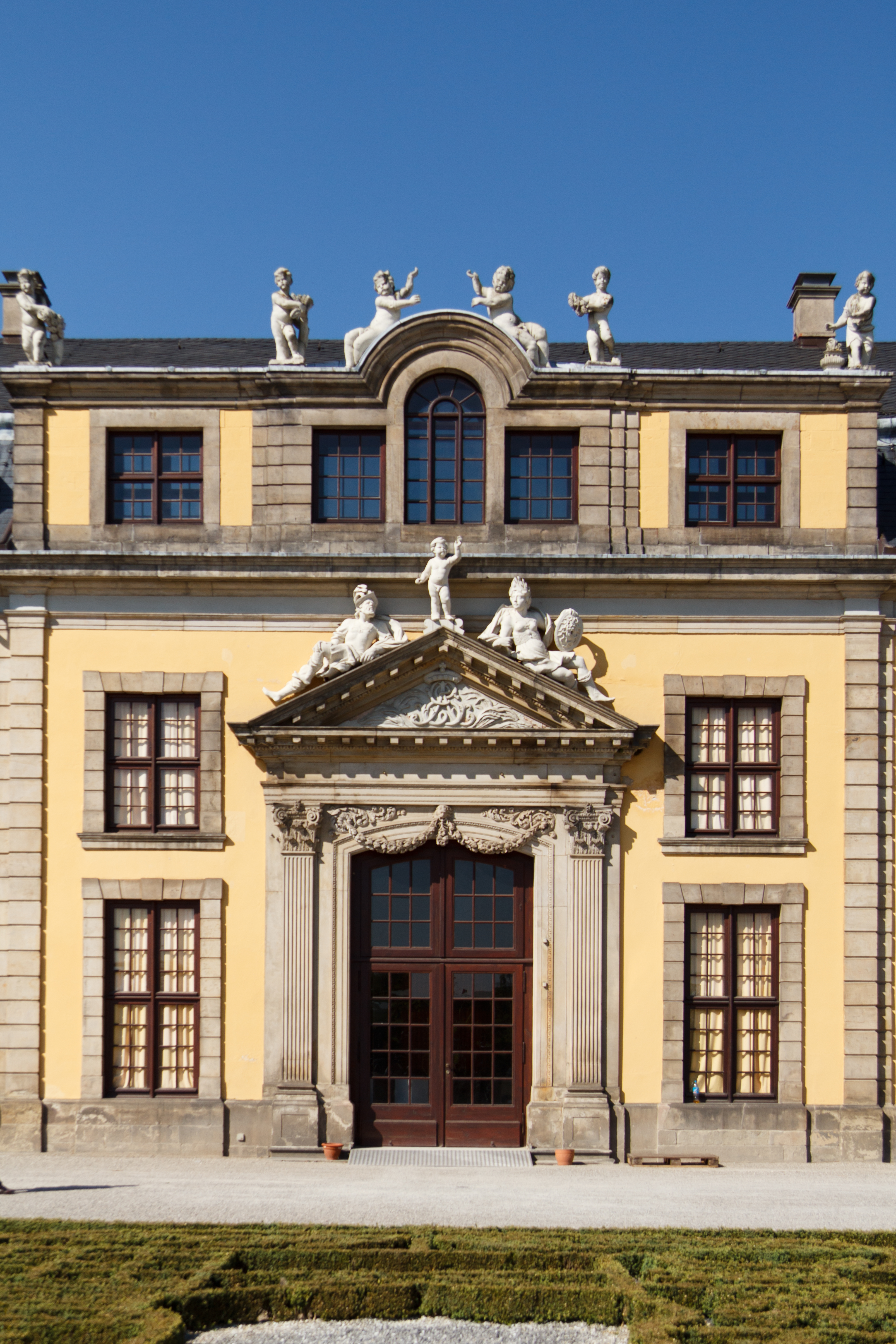 Gartenfassade (Mittelrisalit) des Galeriegebäudes im Großen Garten in Hannover, Herrenhausen.